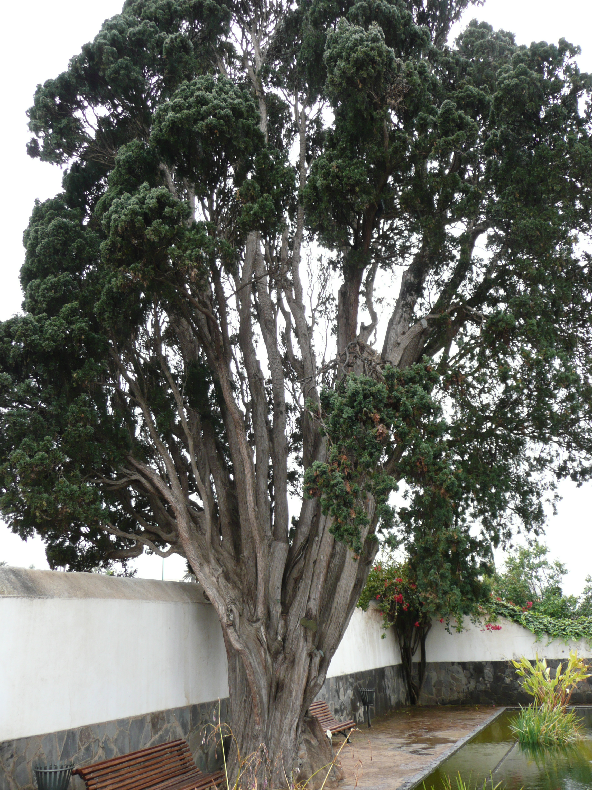 Cupressus benthamii in Jardín de Aclimatación de la Orotava Map: 28° 24' 39" N, 16° 32' 7" W